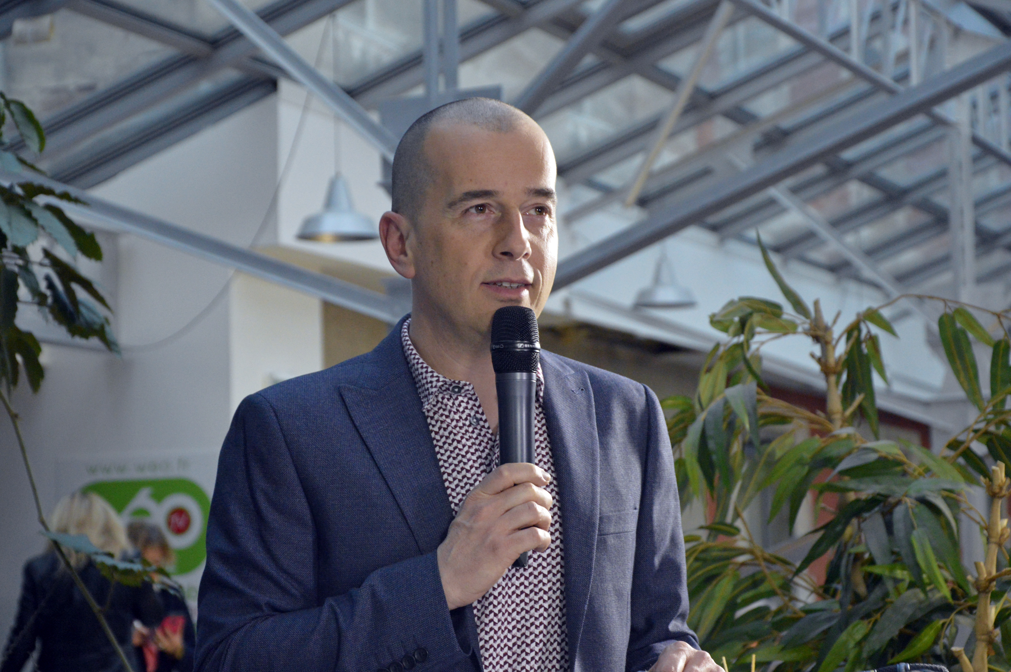 En direct sur le plateau avec Laurent Dereux